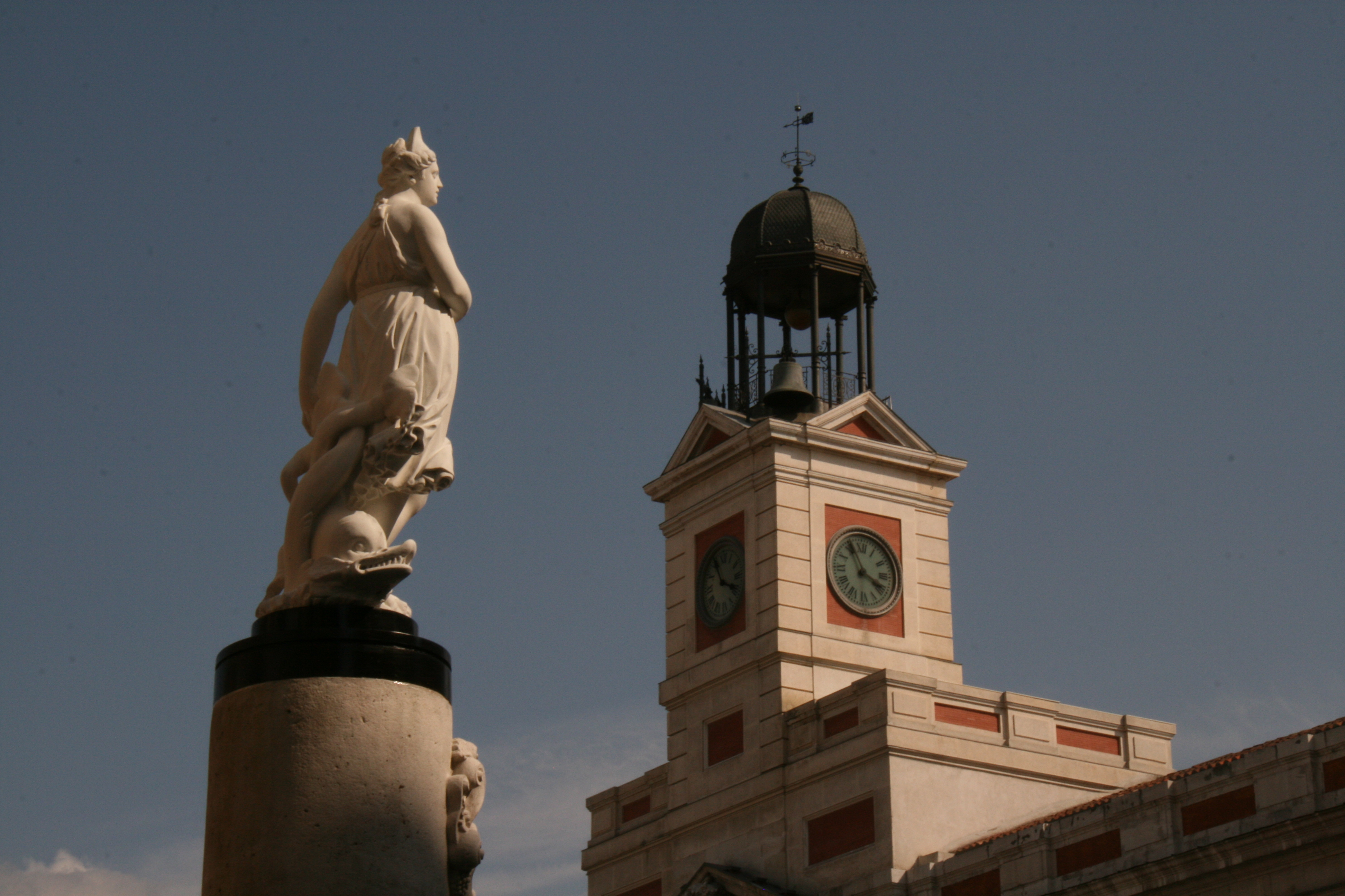 La mariblanca en la Puerta del Sol - sept (2009)